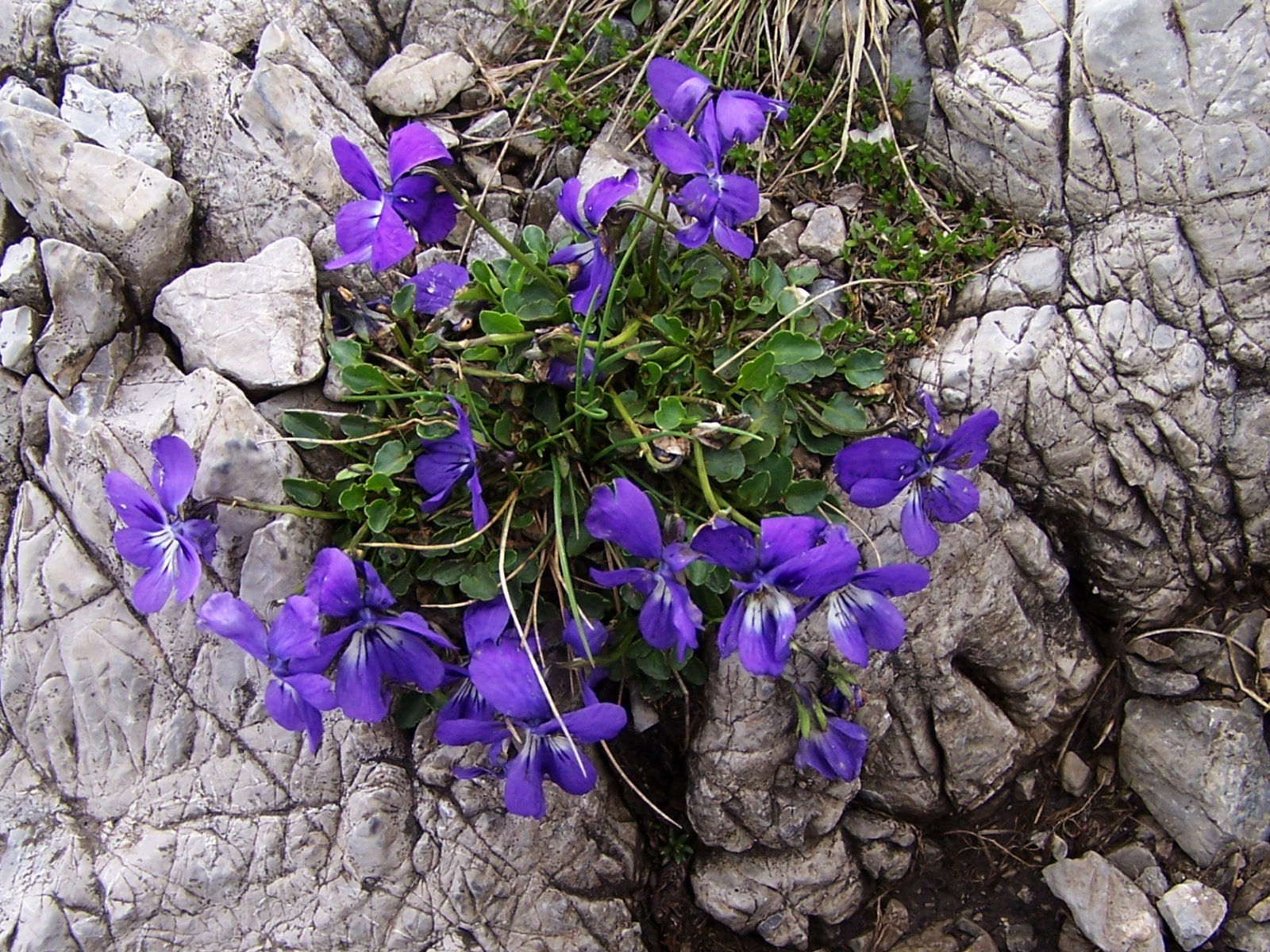 'Viola alpina (pl. fiołek alpejski), habitat: Tatra Mountains, Czerwone Wierchy, Kobylarzowy Żleb